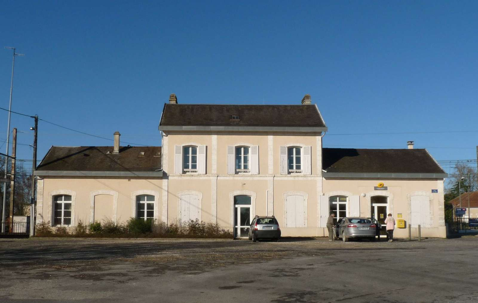 gare de Luxé, Charente, France